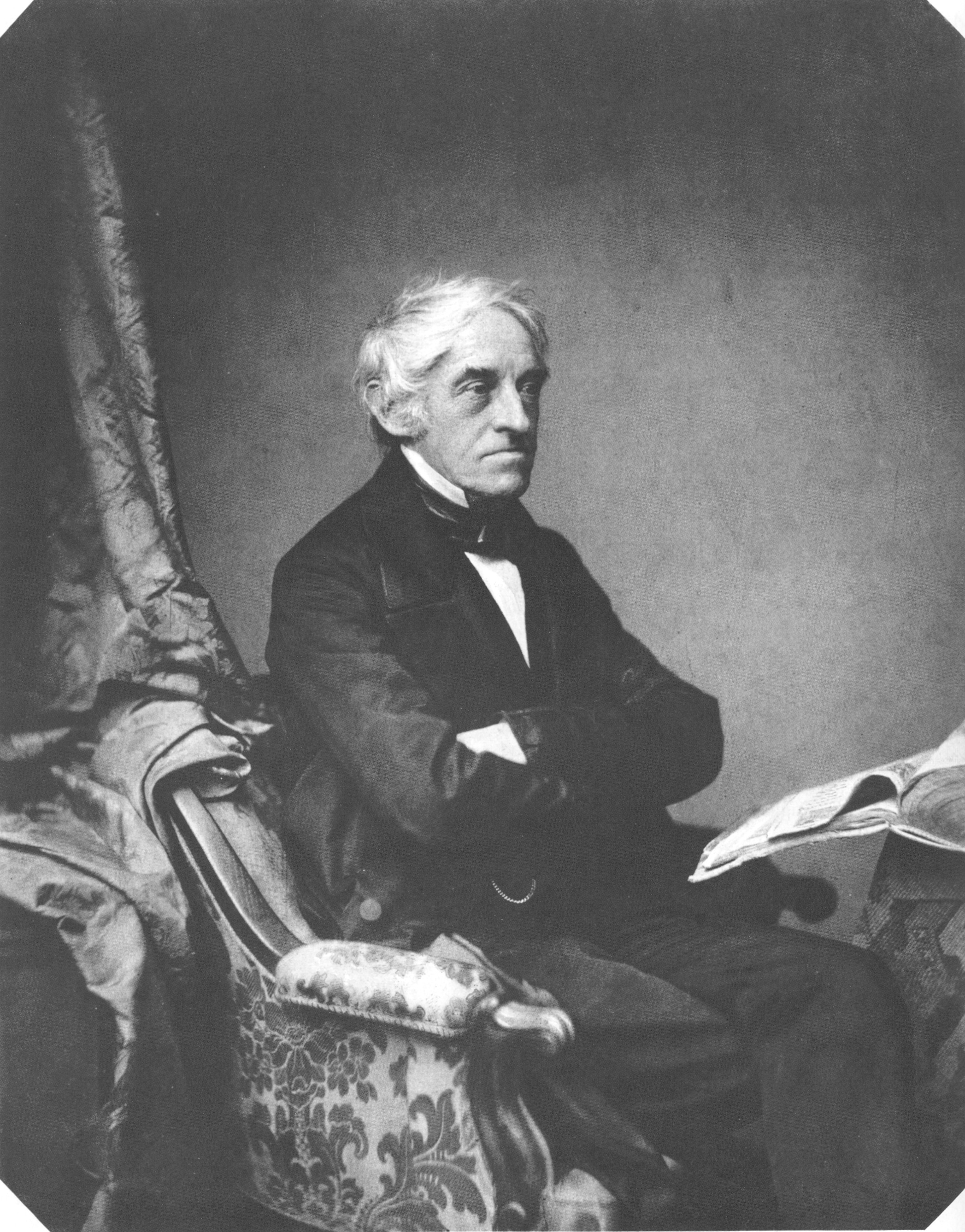 Karl Friedrich Philipp Martius (1794-1868)